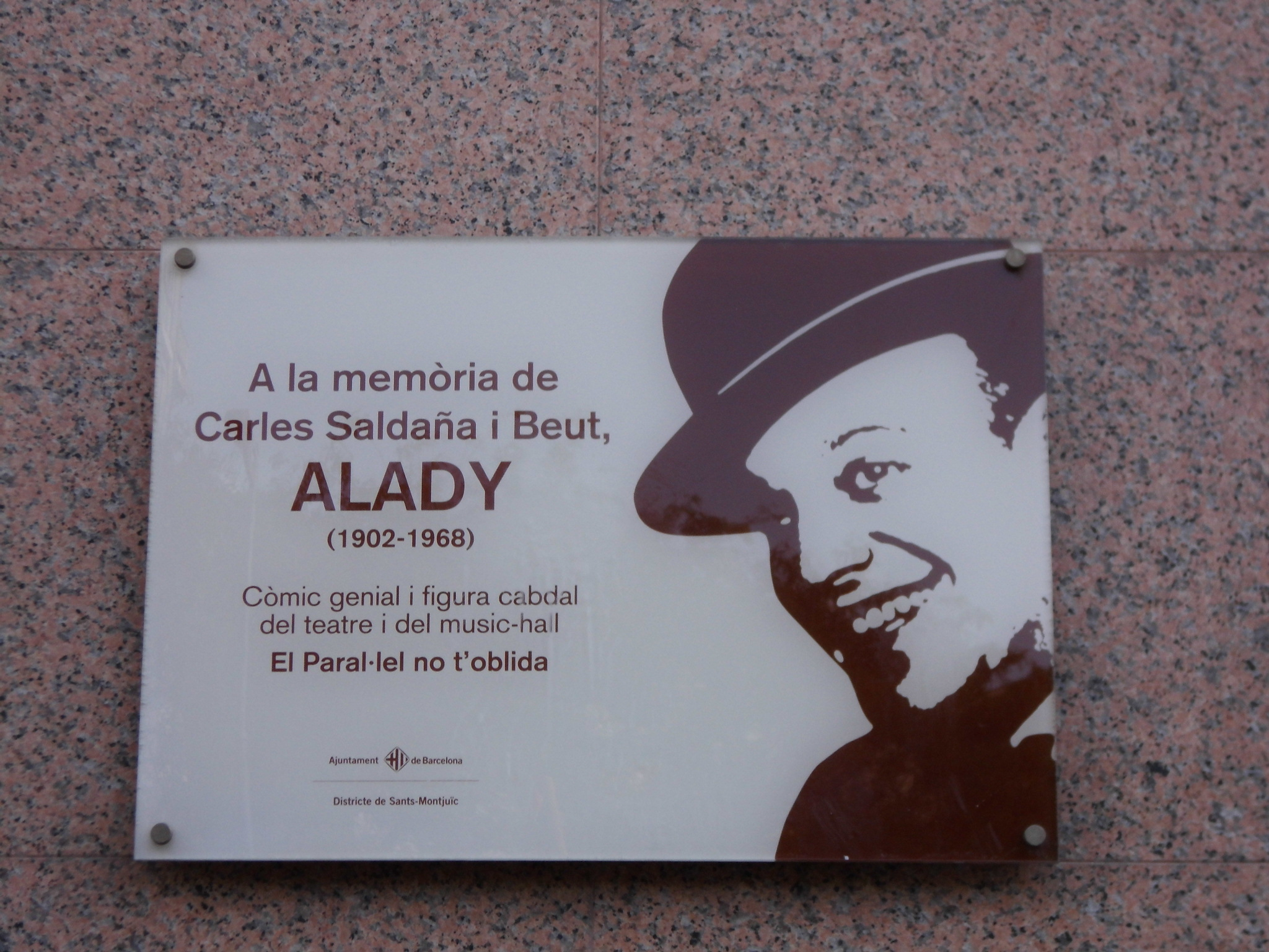 Carles Saldaña "Alady". Av. Paral·lel, 57 (Barcelona)